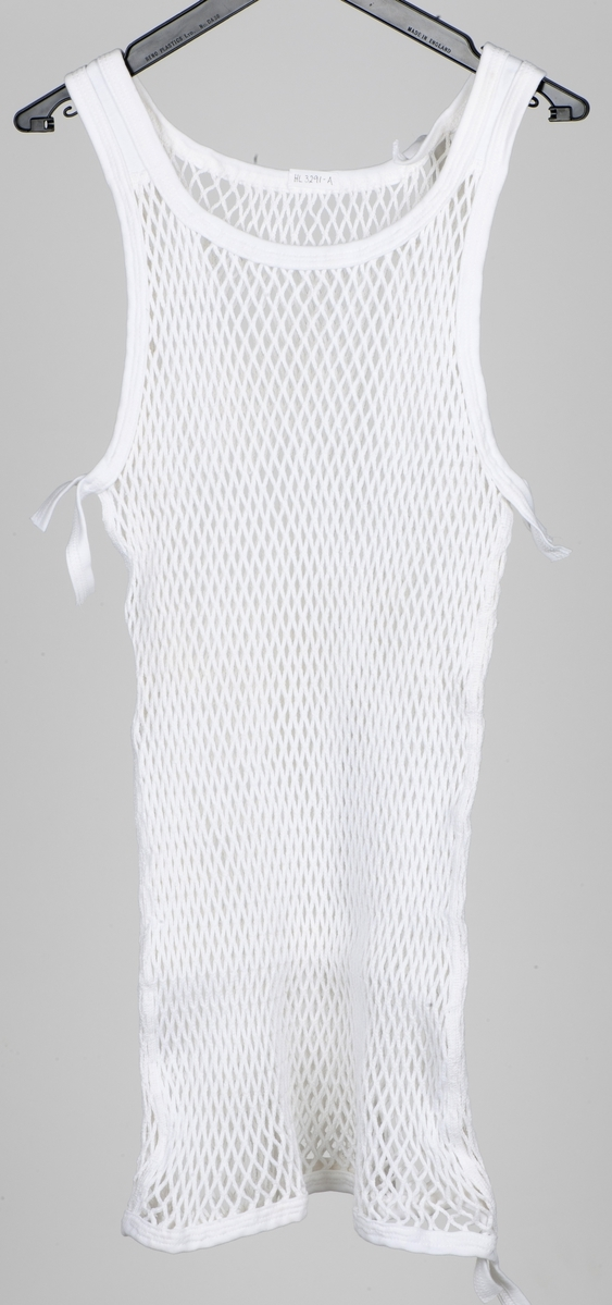 Helsetrøye, nesten ferdig montert